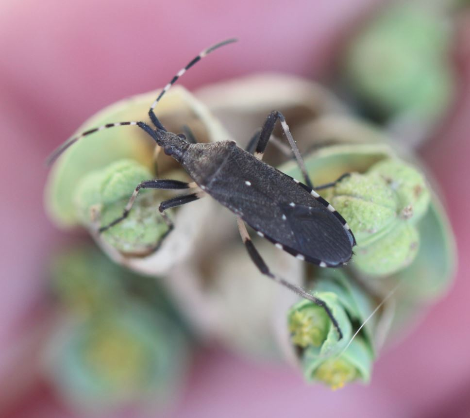 Wanze Dicranocephalus agilis am 24. Juni 2019 an der Côte d’Azur